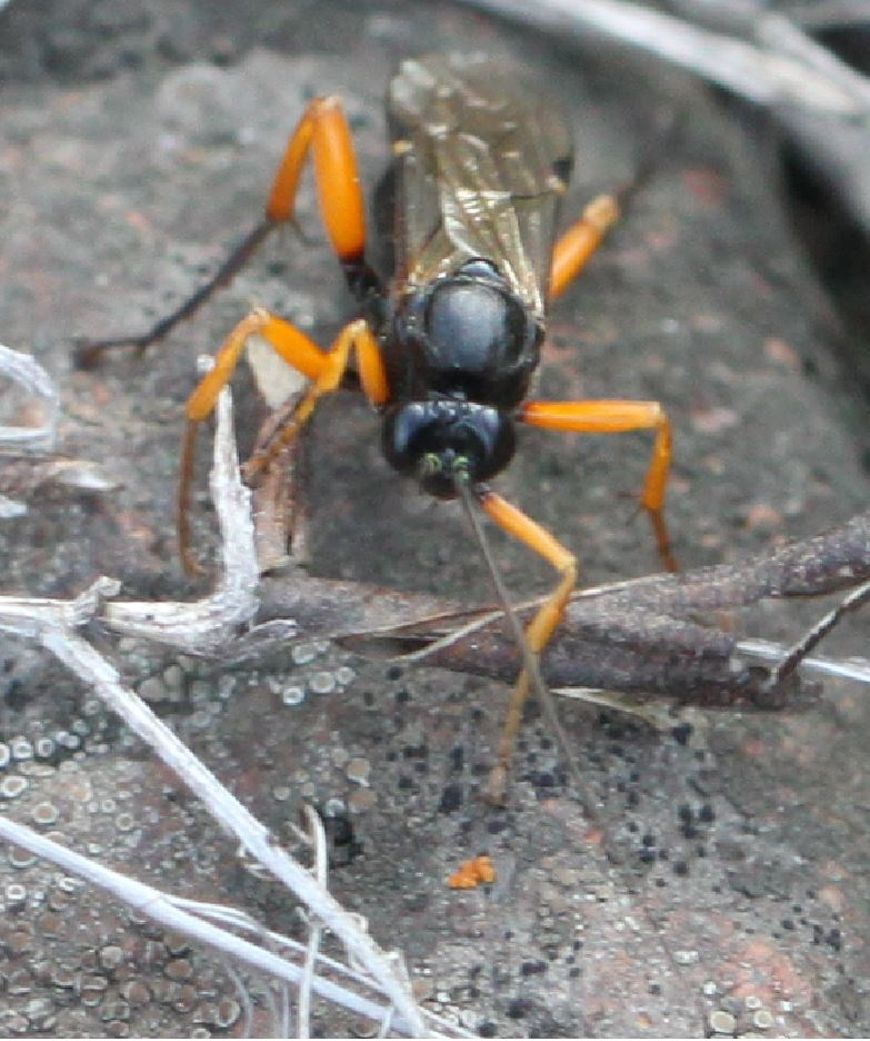 Schwarze Schlupfwespe (Pimpla rufipes), Weibchen, inspiziert die Steine eines Bahndamms, am 10. Oktober 2018 in der Schwetzinger Hardt